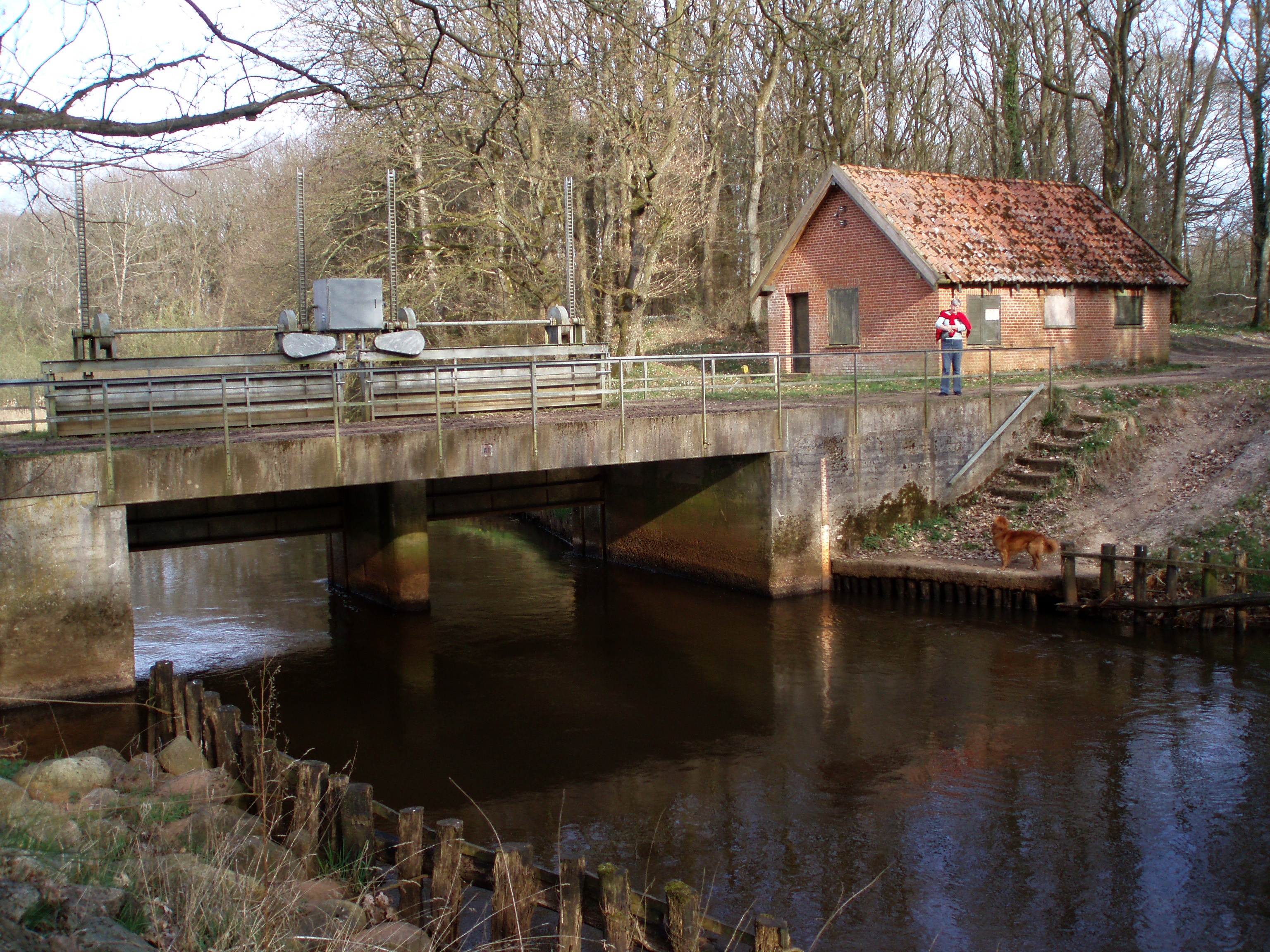 Ansager Stemmeværk ved Varde Å hvor kanalen begynder.